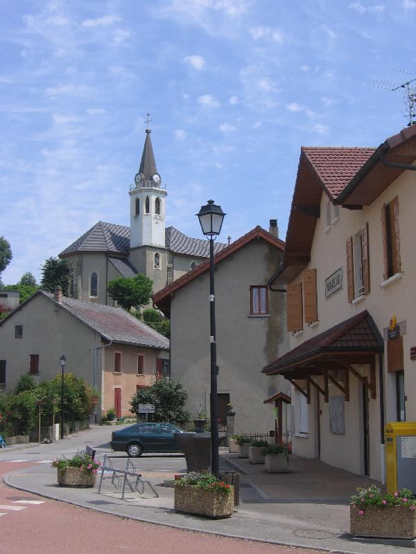 L'Eglise et la Mairie au centre du village de Challonges, Haute-Savoie